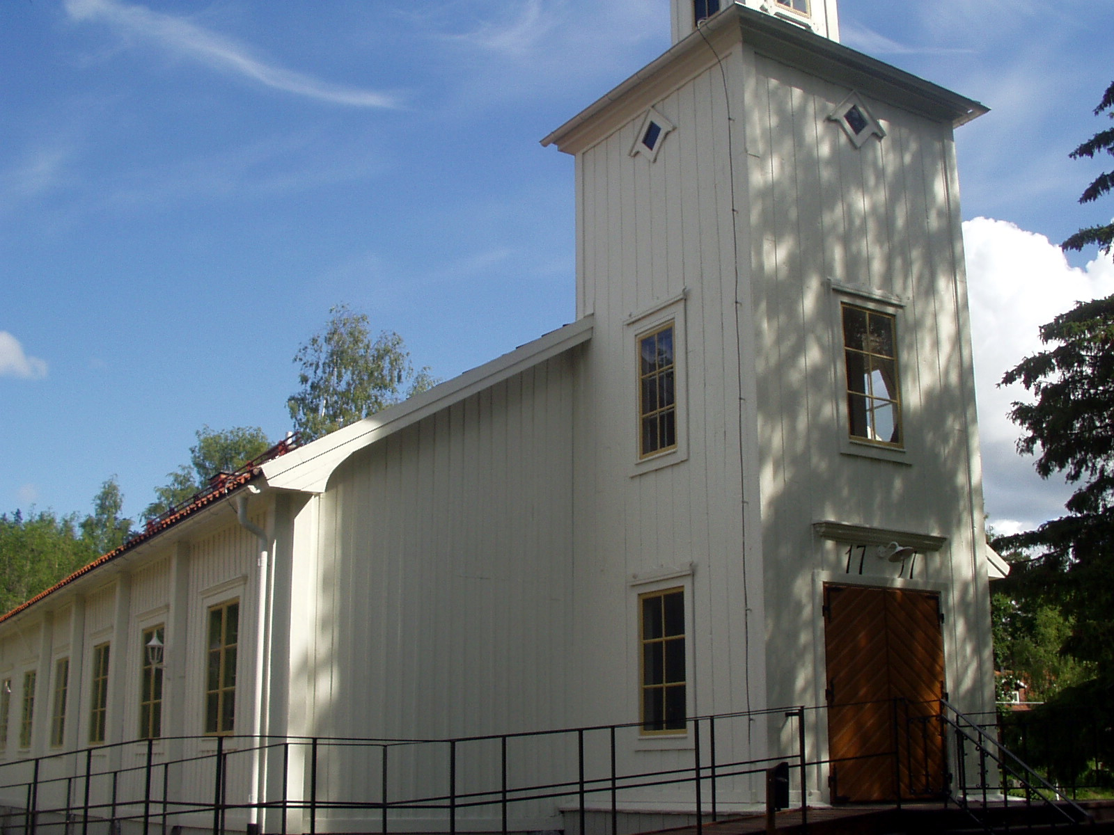 Nianfors kyrka